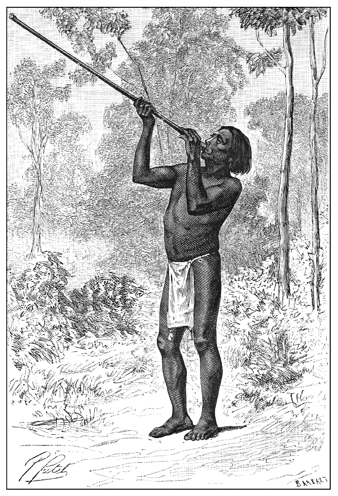 Indio de la etnia Huottuja (Piaroa) sosteniendo una cerbatana (que en general son considerablemente más largas que la que muestra el grabado). Reproducido de Crevaux y Lejanne (1882: 295). Digitalizado de una copia en la biblioteca de G. A. Romero-González.